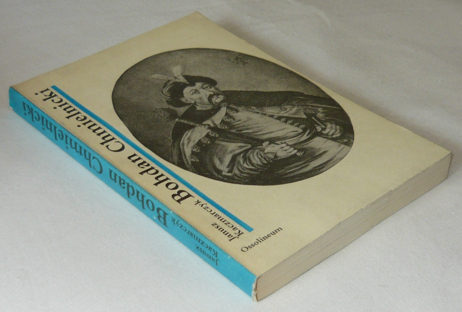 Książka, biografia, Janusza Kaczmarczyka o atamanie kozackim Bohdanie Chmielnickim. Cykl biograficzny Ossolineum, 1988 rok.